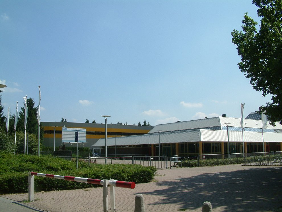 IJssportcentrum Eindhoven in Eindhoven (Genneper Parken)